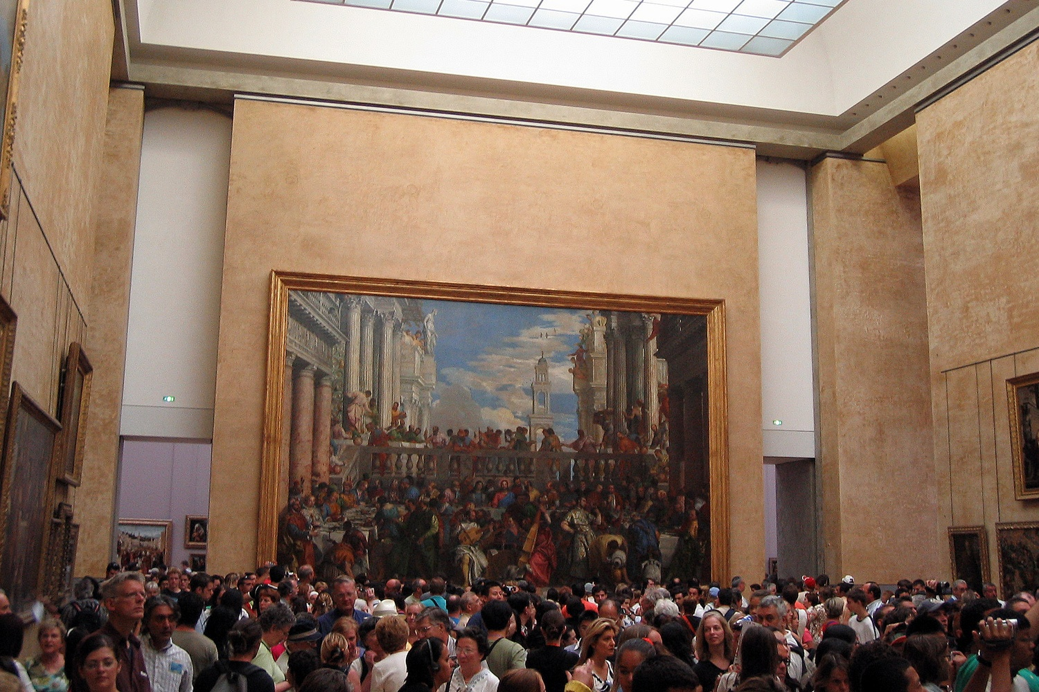 Frankreich, Datum/Uhrzeit: 11.08.2005 11:43:27